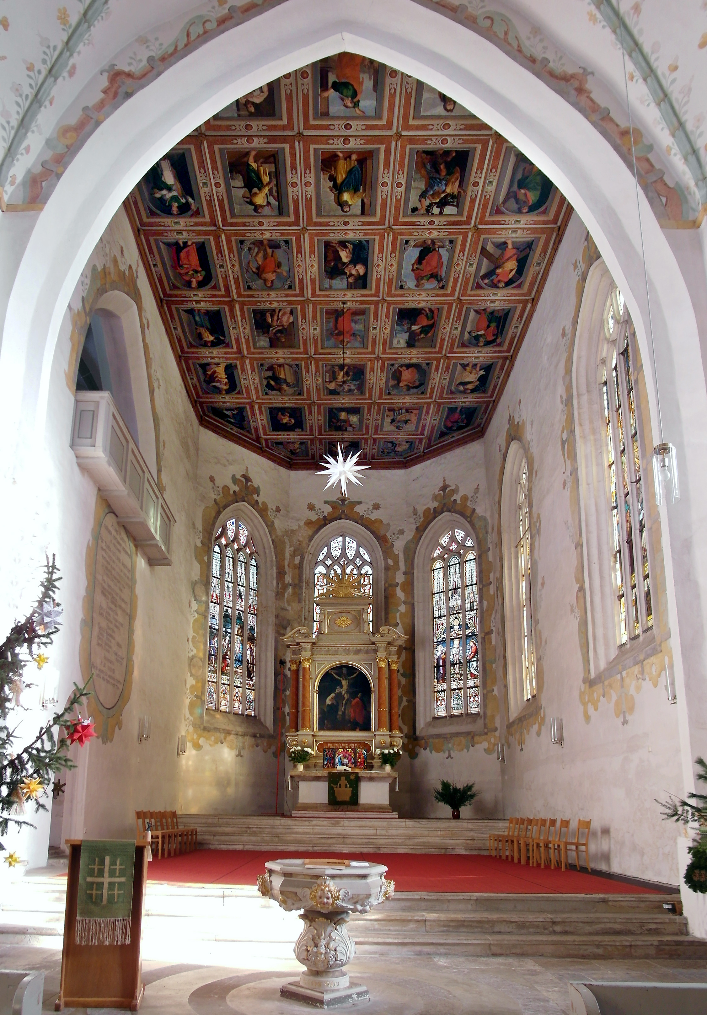 21.01.2016 01774 Dippoldiswalde, Kirchplatz: Stadtkirche St. Marien und Laurentius. Gotik aus d. ersten Jahren des 16. Jh. auf romanischer Grundlage, 1638 erneuert 1841 neugotisch renoviert. Blick in d. Chor. Kassettendecke von Hans Panitz aus Dresden, 1642. Christus in der Mitte ist umgeben von Evangelisten, Propheten und Aposteln. Bald nach 1638 kamen die Kanzel, der Taufstein, u.der der Altar, gemalt vom Hofmaler Johann Fink aus Dresden. [SAM2876.JPG]20160121100.DR.JPG(c)Blobelt